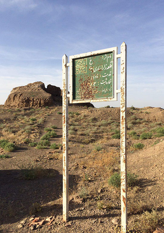 تابلو قلعه ساربلاغ دوره مادی